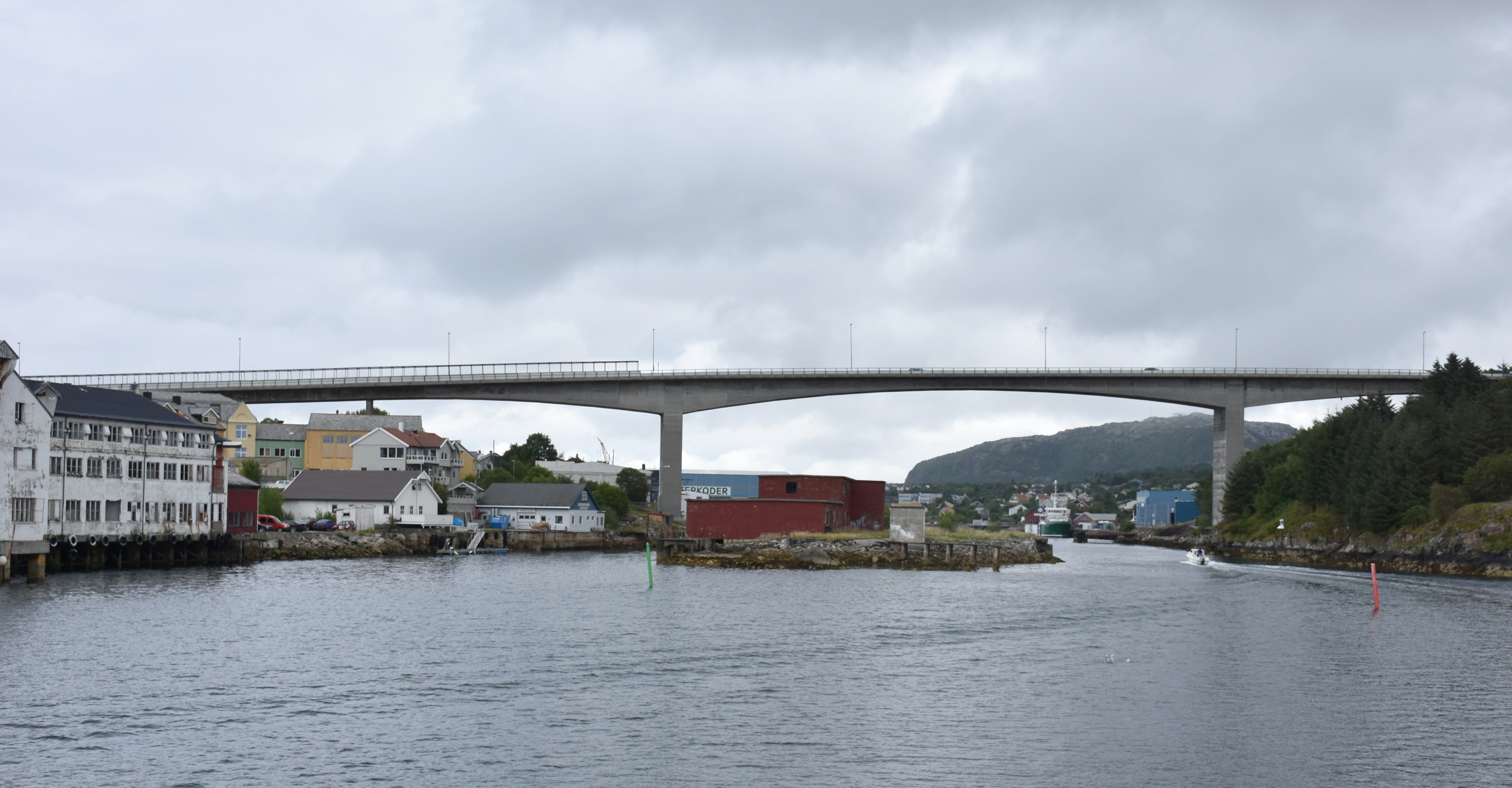 Nordsundbrua med Wilhelm Dalls vei (riksvei 70)